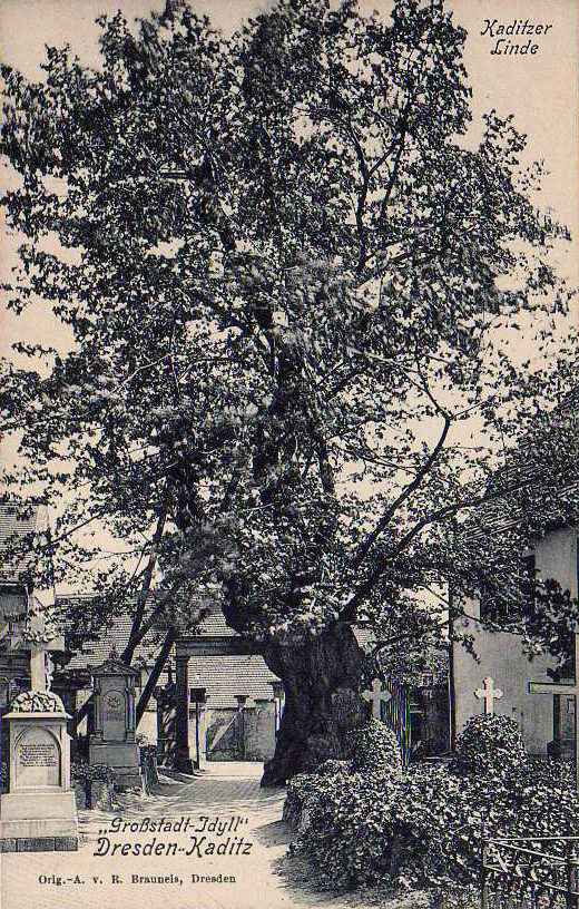 Kaditzer Linde